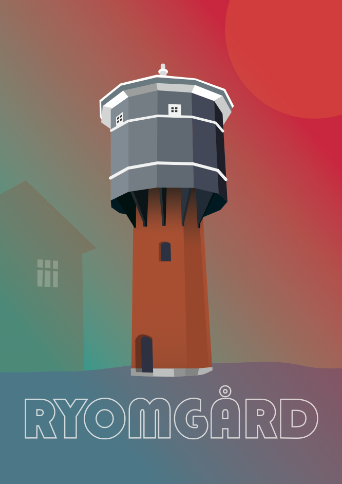 Grafisk fremstilling af vandtårnet til promovering af byen